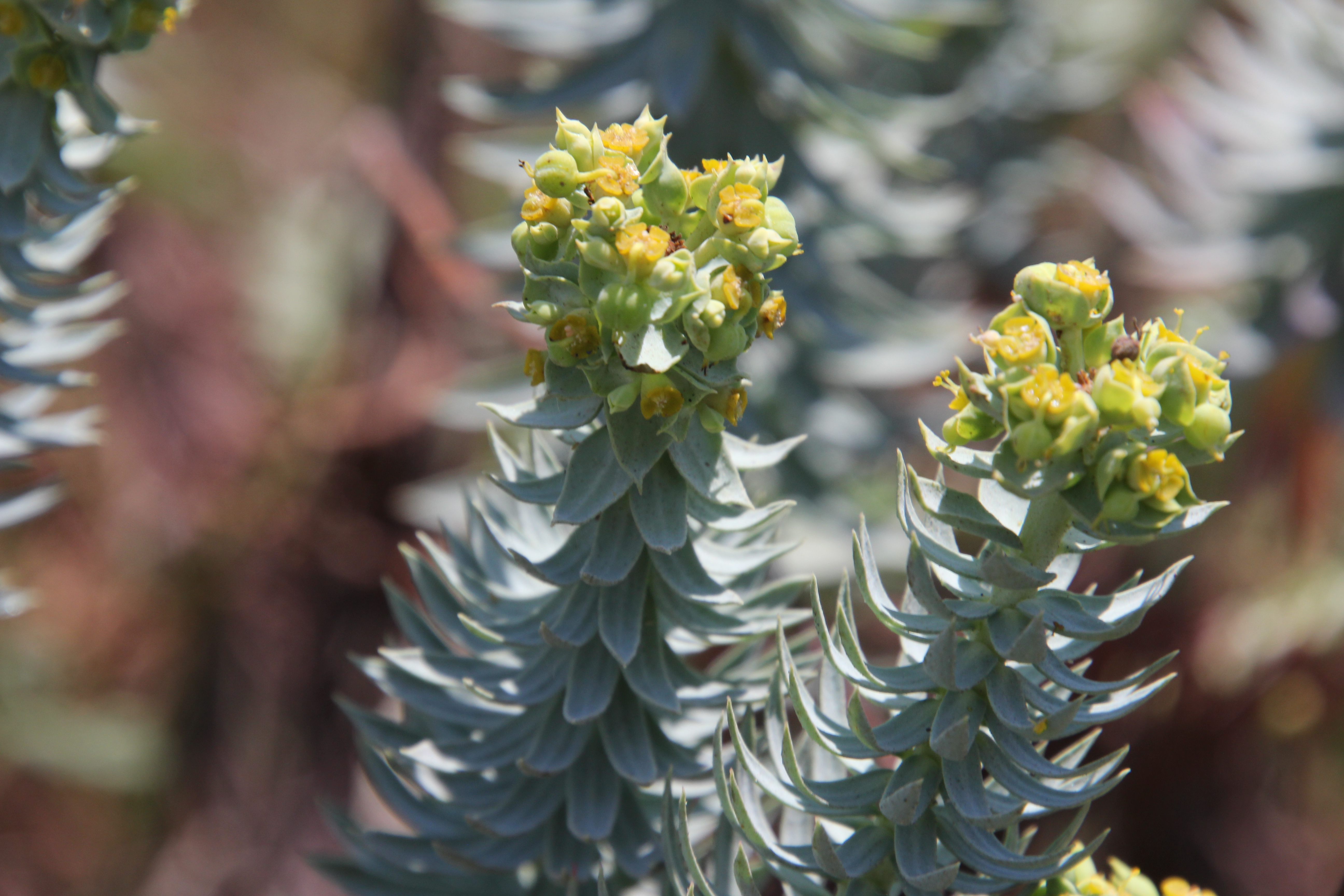 Flora della Sardegna